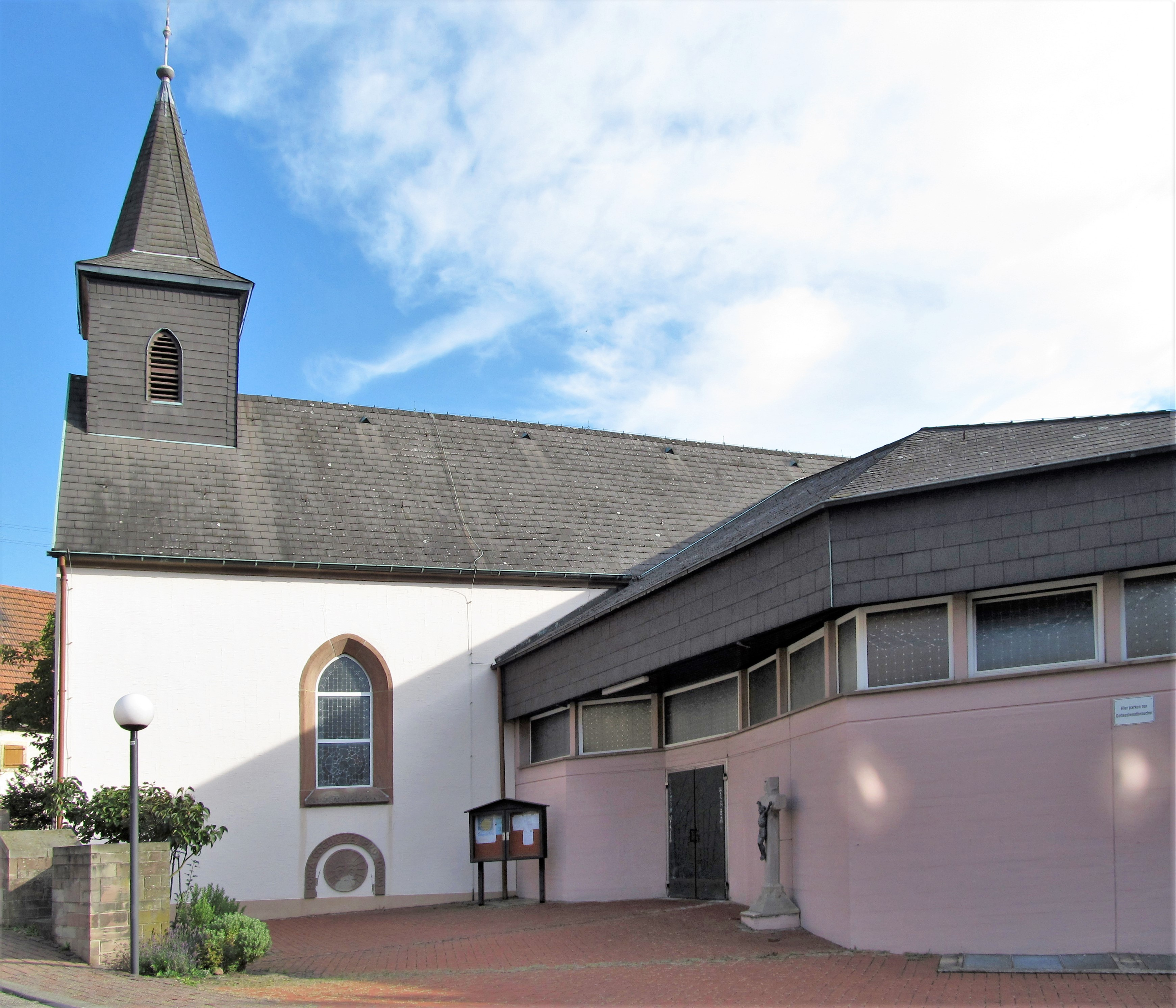 Katholische Kirche St. Maria Geburt in Höchen, einem Stadtteil von Bexbach, Saarland